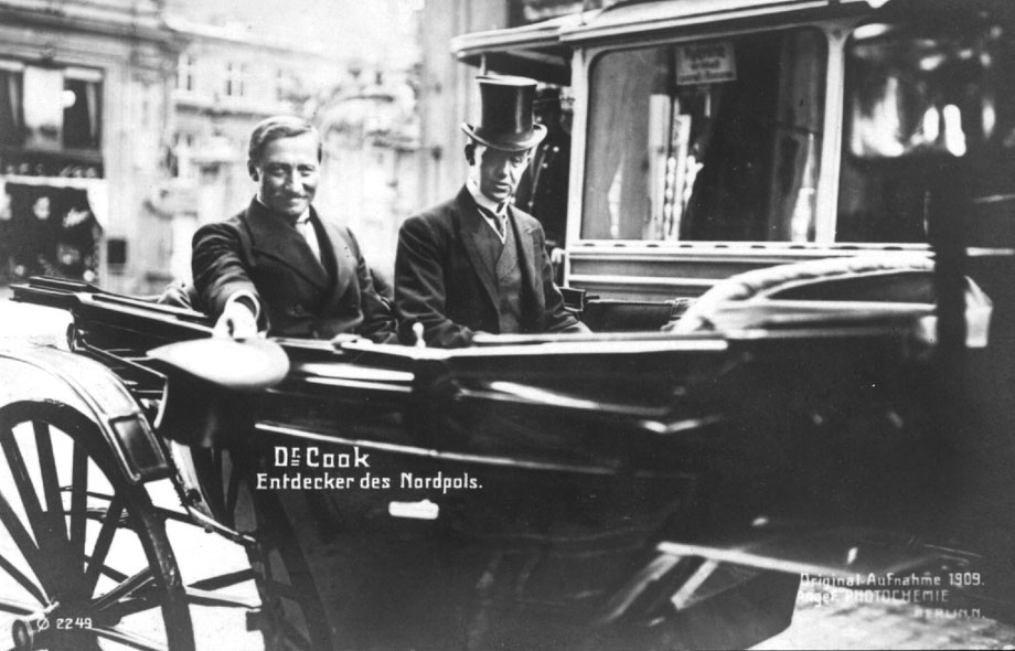 Frederick Cook acclamato come un eroe al suo arrivo a Copenaghen